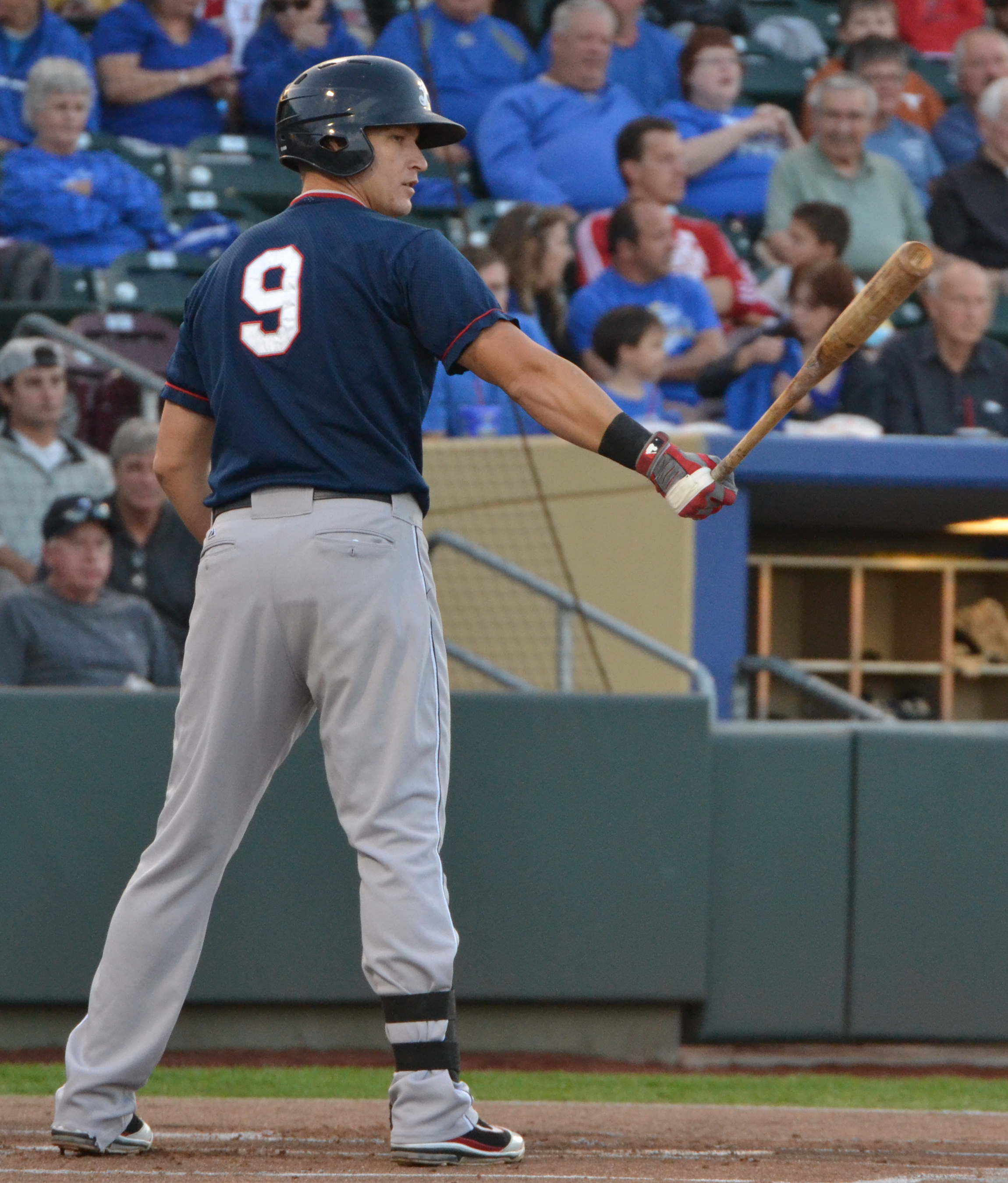 Mike Jacobs